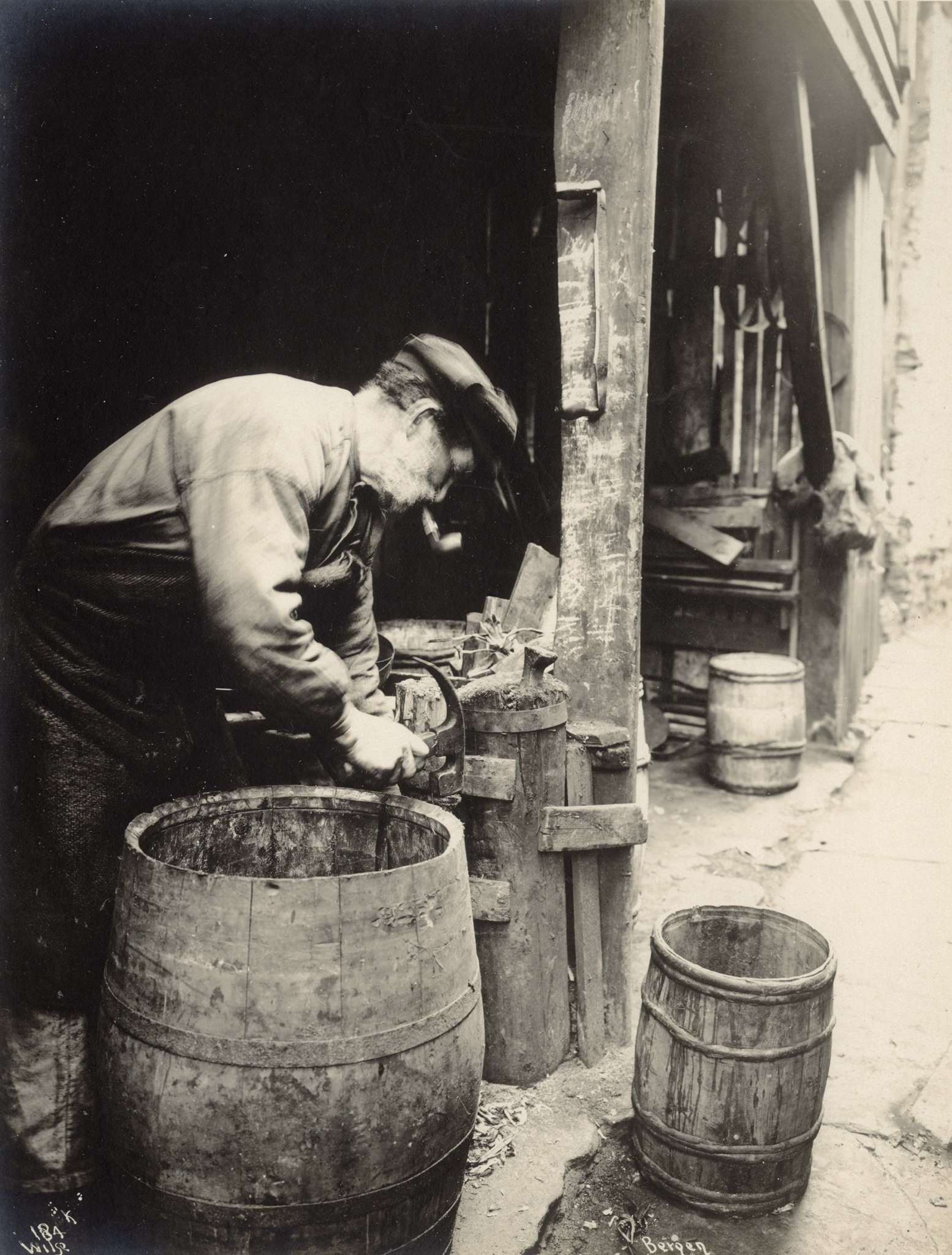 Bryggen Tyskebryggen Fotograf: Wilse, Anders Beer (1865-1949) Datering: Ca 1910 til 1920 Sted: Bergen Hordaland Se flere bilder på Kulturminnebilder